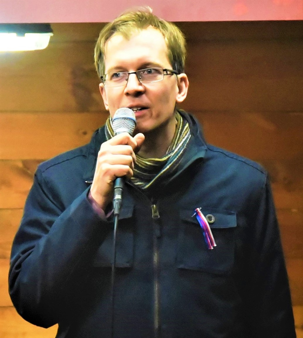 Pavel Čižinský, starosta Prahy 1